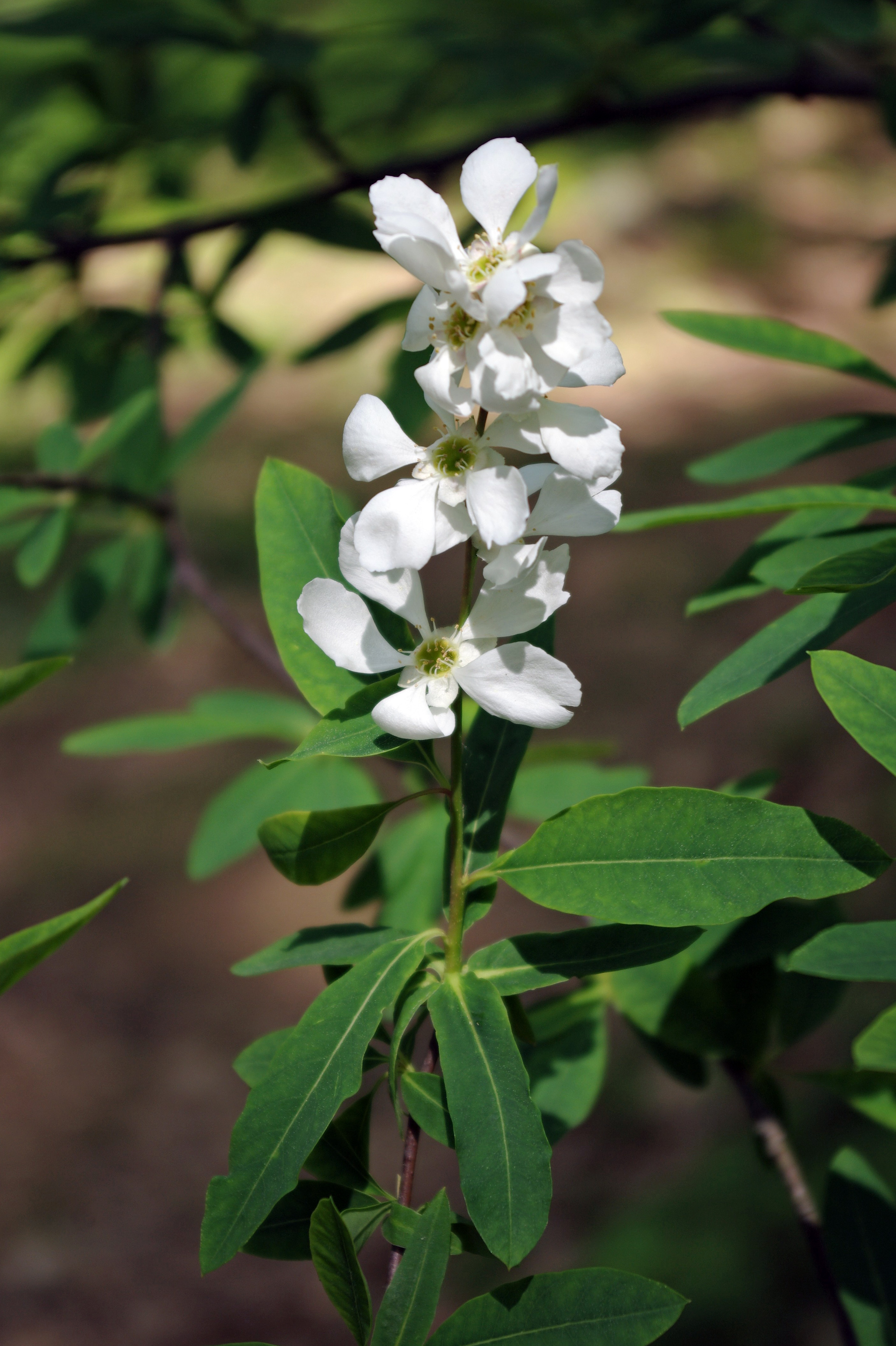 Exochorda racemosa